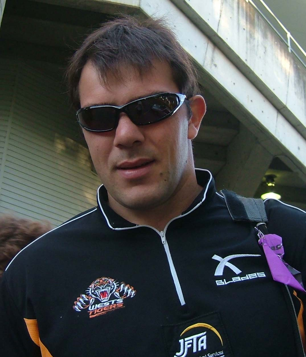 Wests Tigers Prop - John Skandalis at Parramatta Stadium 2005.